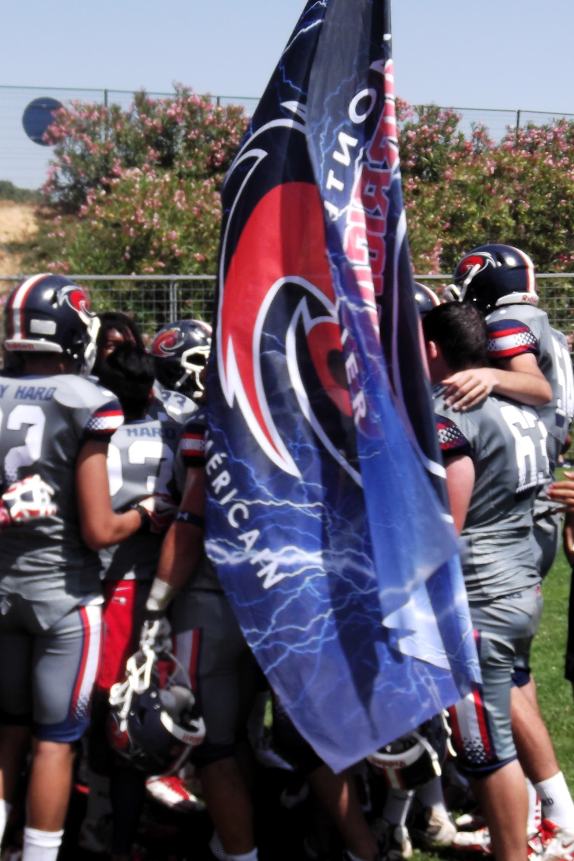 Fin de match, championnat de France Junior (J9), Hurricanes vs Blue Stars Marseille (08.06.2014).